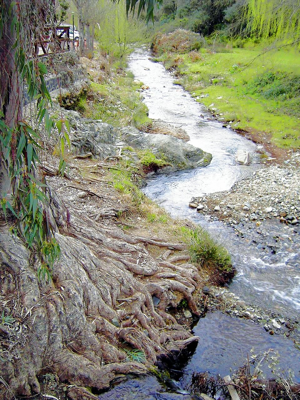 Alajar, en la Sierra de Aracena y Picos de Aroche (Huelva)